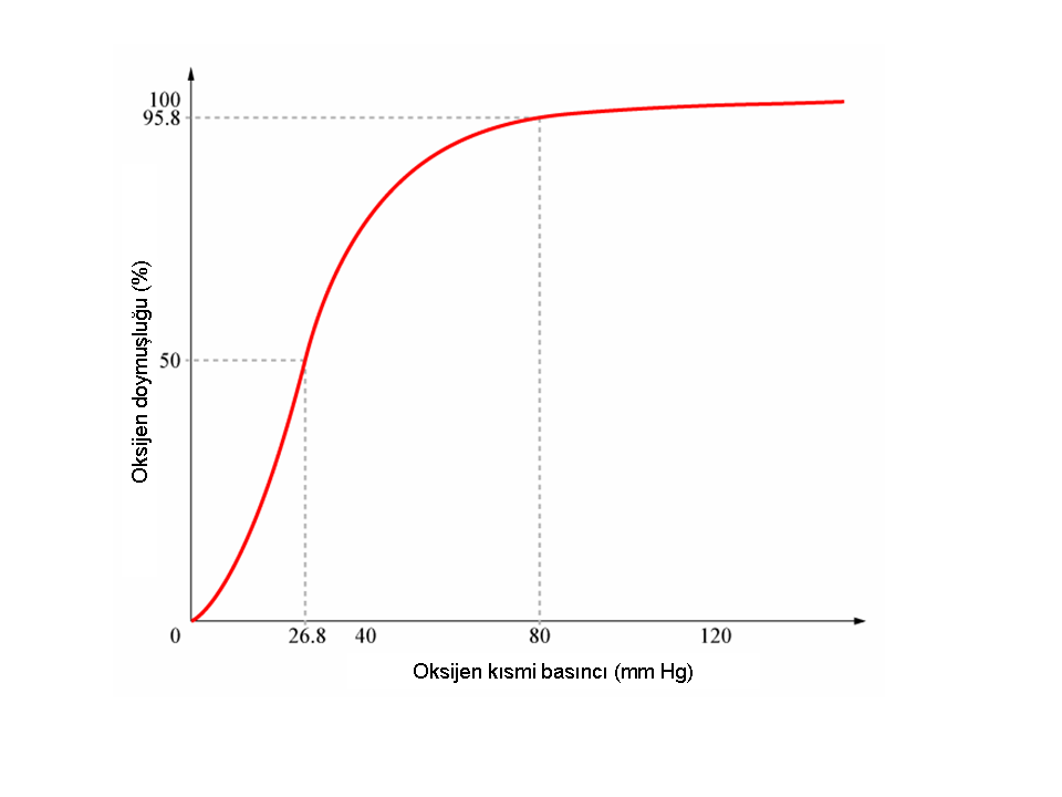 Hb_saturation_curve.png dosyasının eksenlerinin Türkçeleştirilmiş halidir.